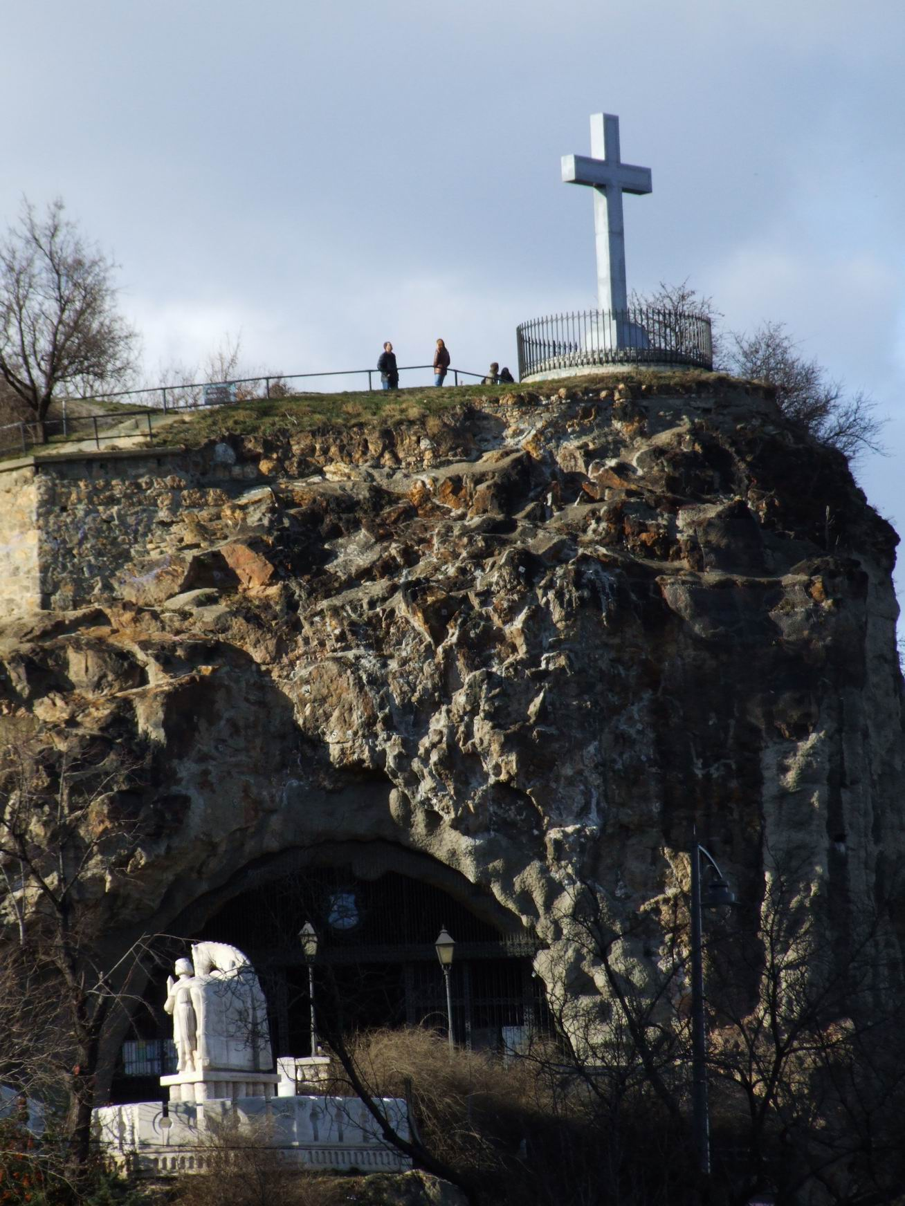 The outer face of the Rockchapel, which belongs to the Hungarian Pauline Fathers at Gellért Hill, Budapest. A Magyar Pálos Rend sziklakápolnája a Gellér-hegy oldalán, Budapesten.